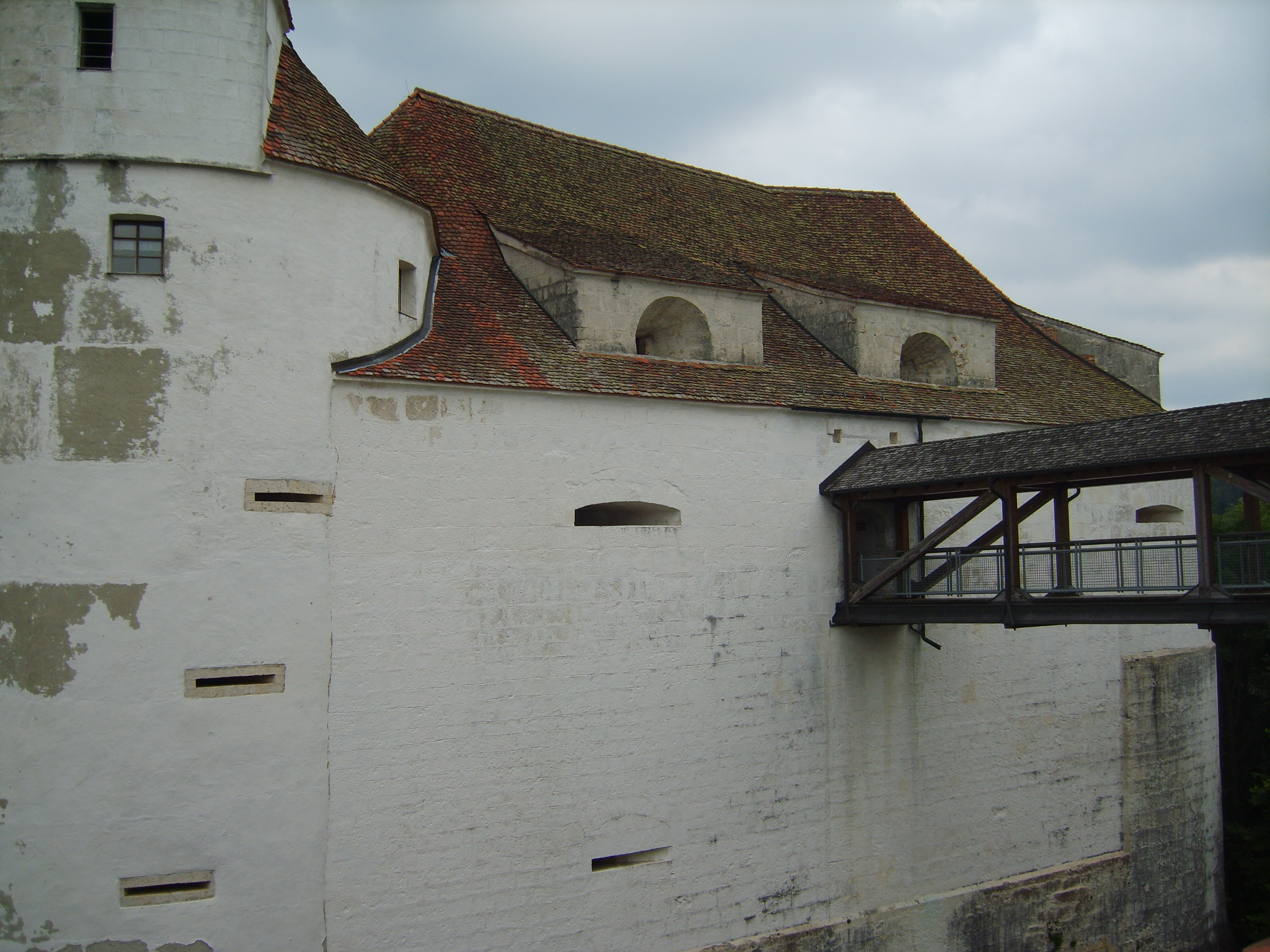 Burg Wildenstein: Tor zur Hauptburg